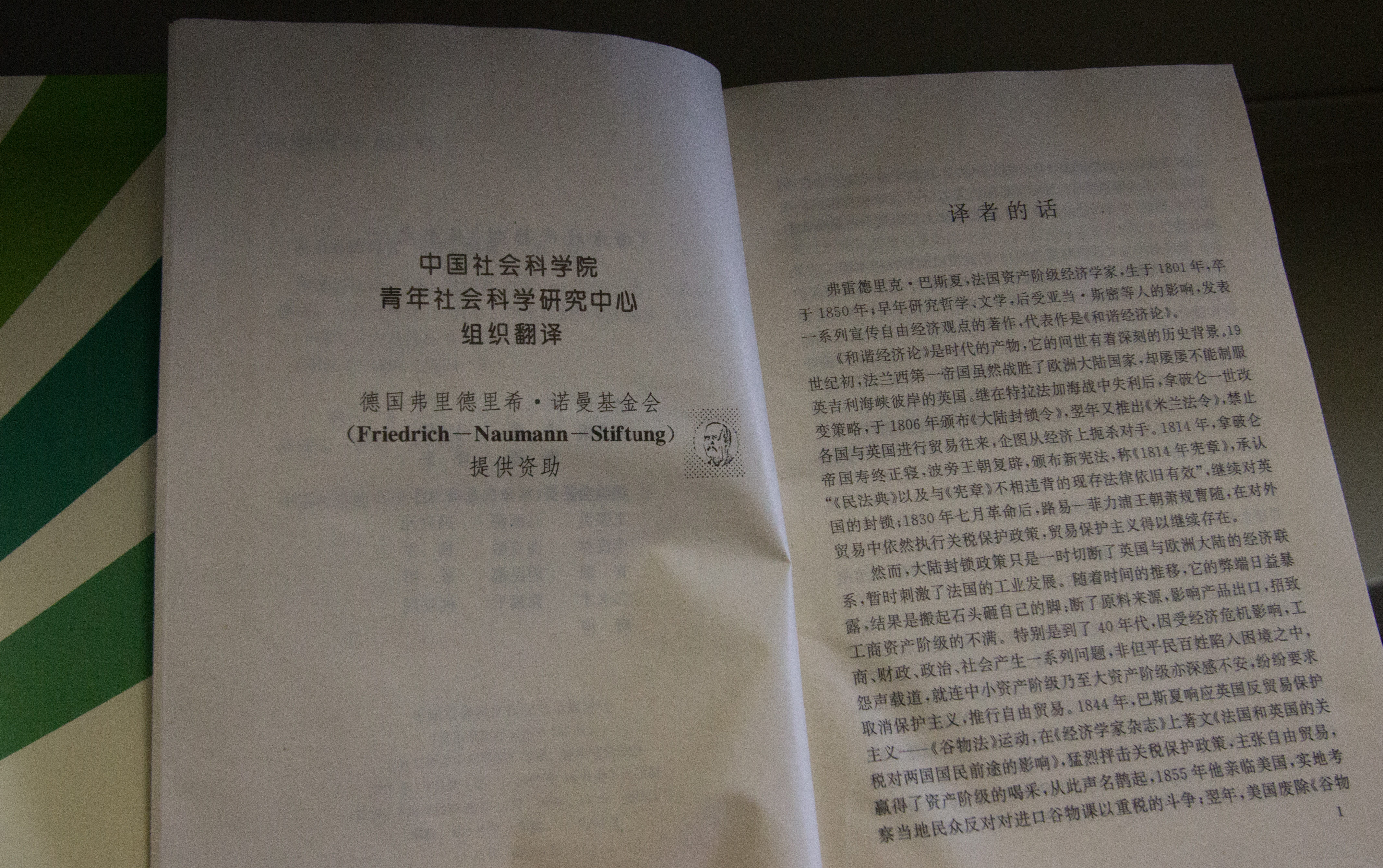 Archiv des Liberalismus in Gummersbach